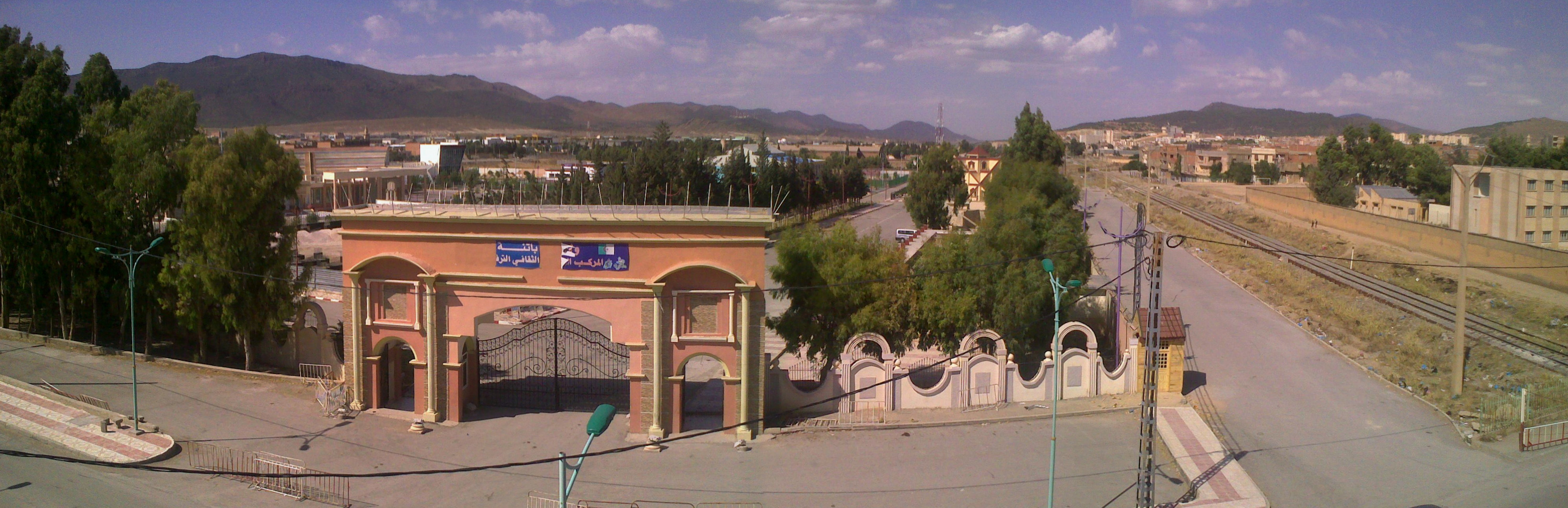 Complexe sportive de Batna de Kchida (Algérie)